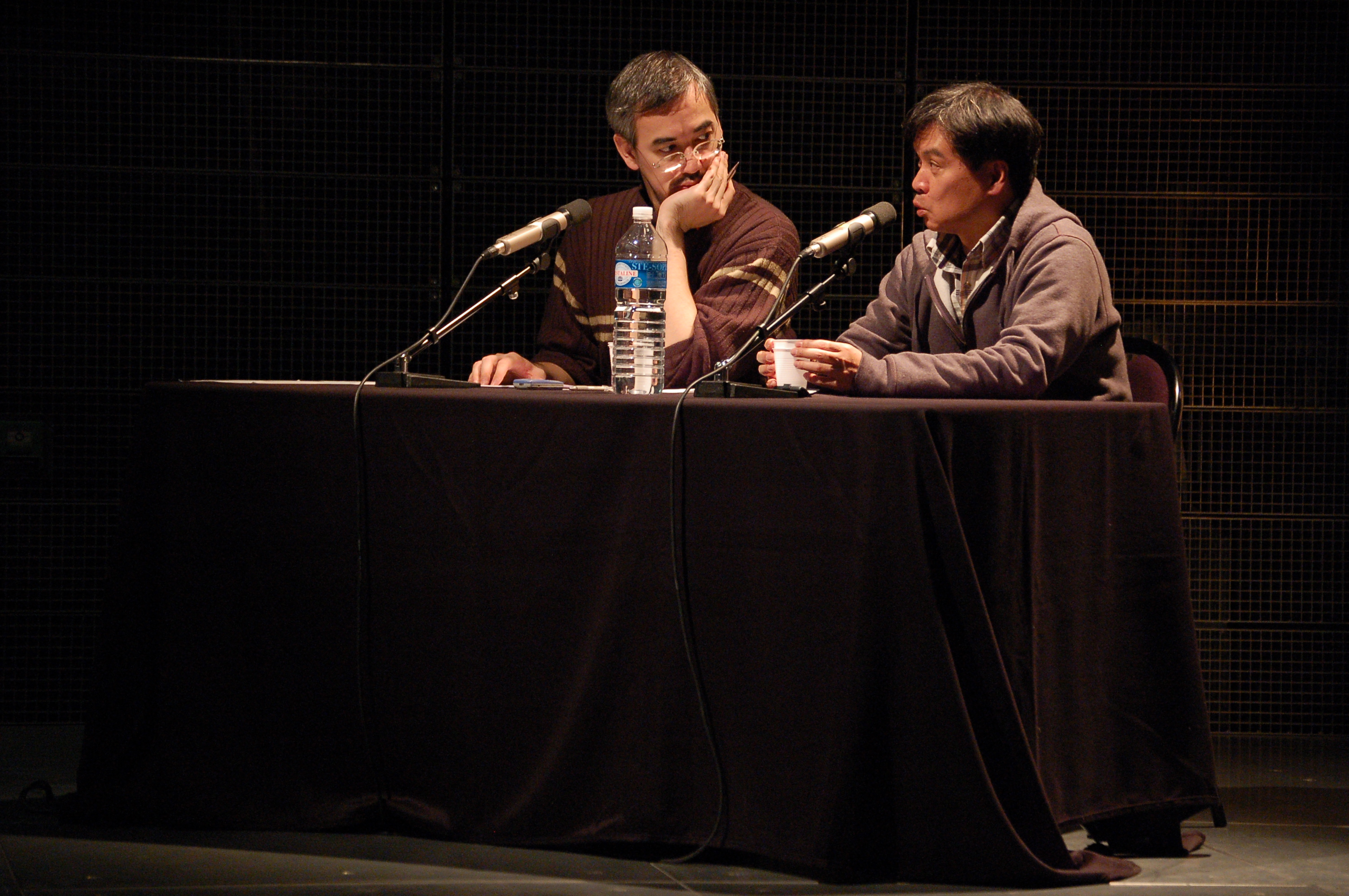 Fête de l'Anim 2006, masterclass du réalisateur japonais Sunao Katabuchi